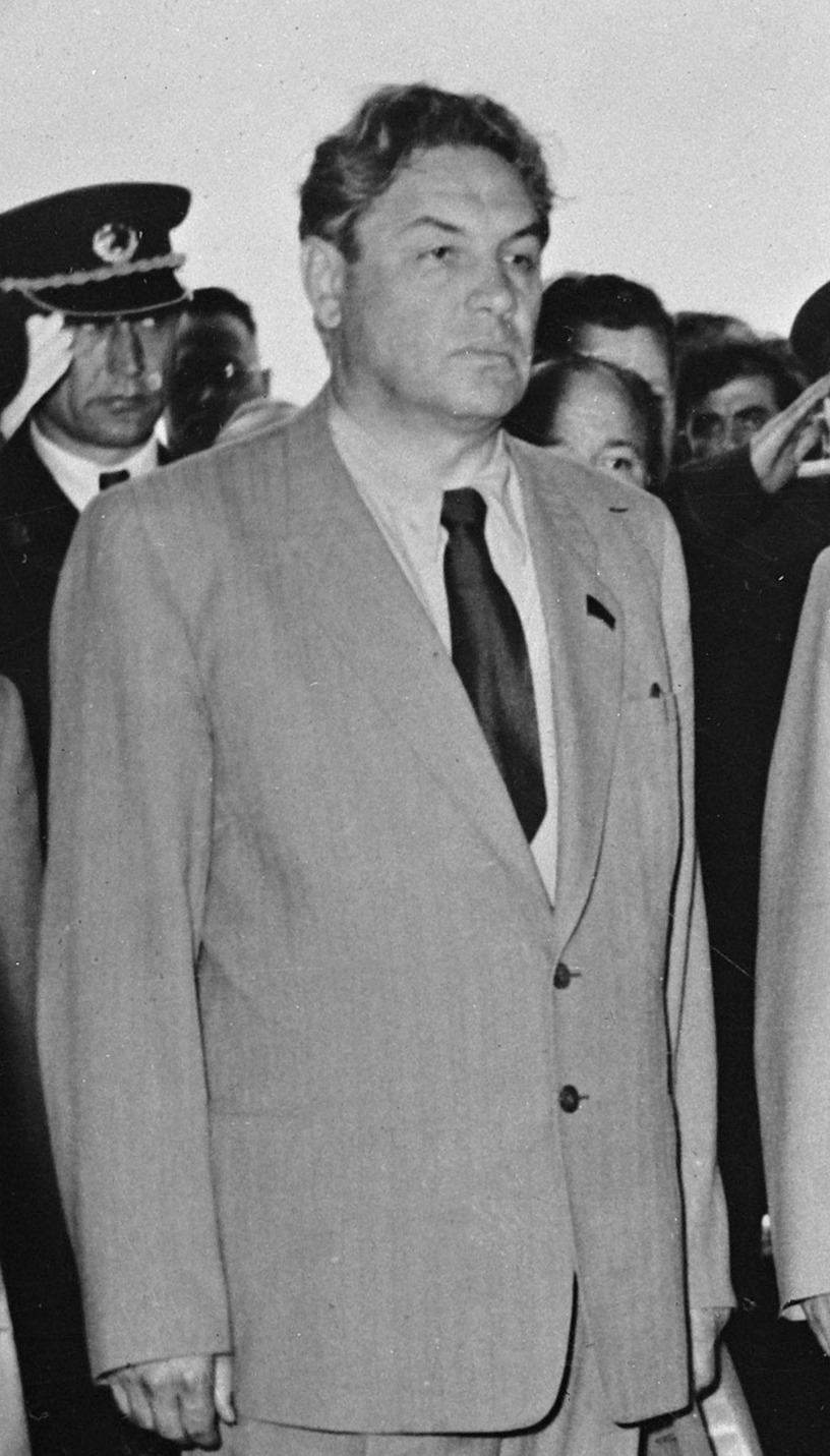 Sjepilov, hoofdredacteur Pravda, opvolger van Molotov